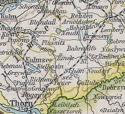 Kreis Briesen, Ausschnitt aus